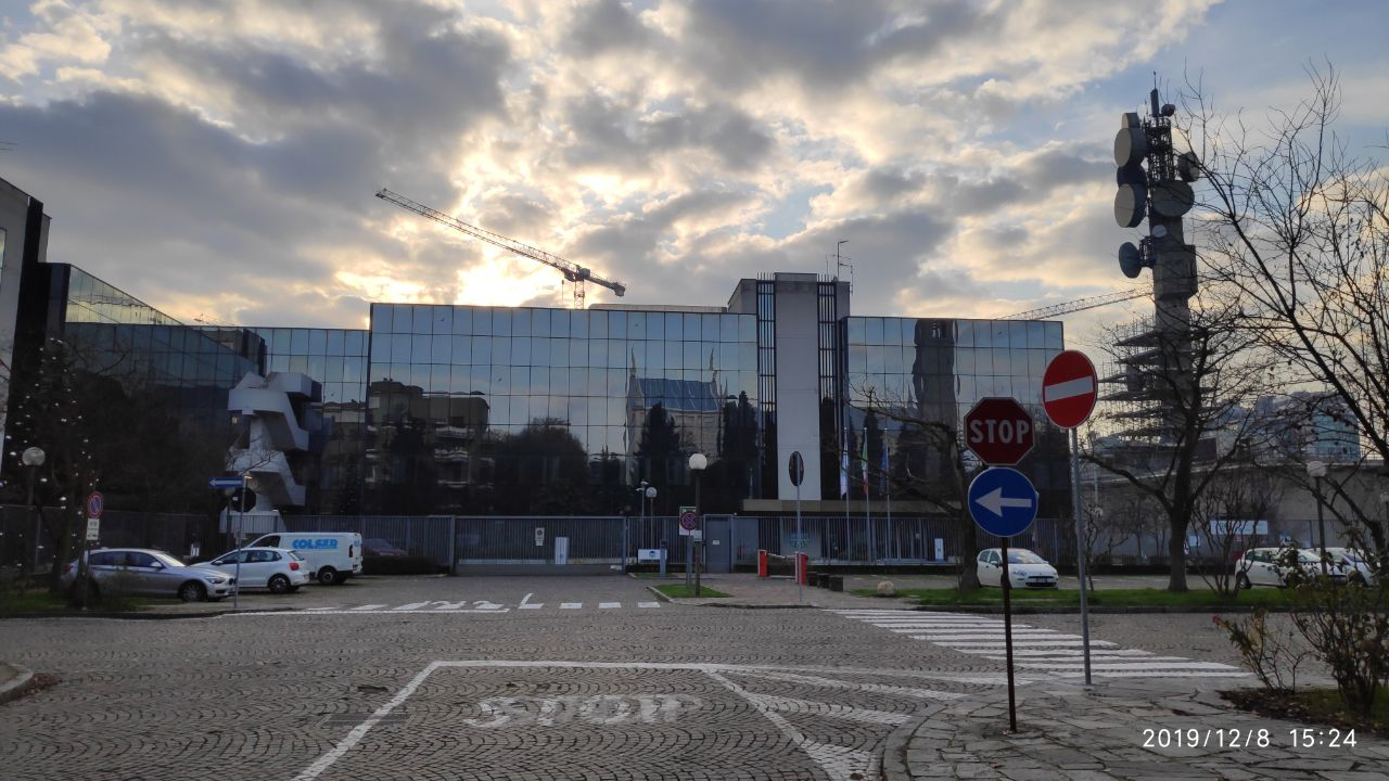 Palazzo di Snam in via Ravenna a San Donato Milanese (dicembre 2019)